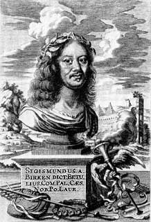 Picture of Sigmund von Birken (1626-1681)